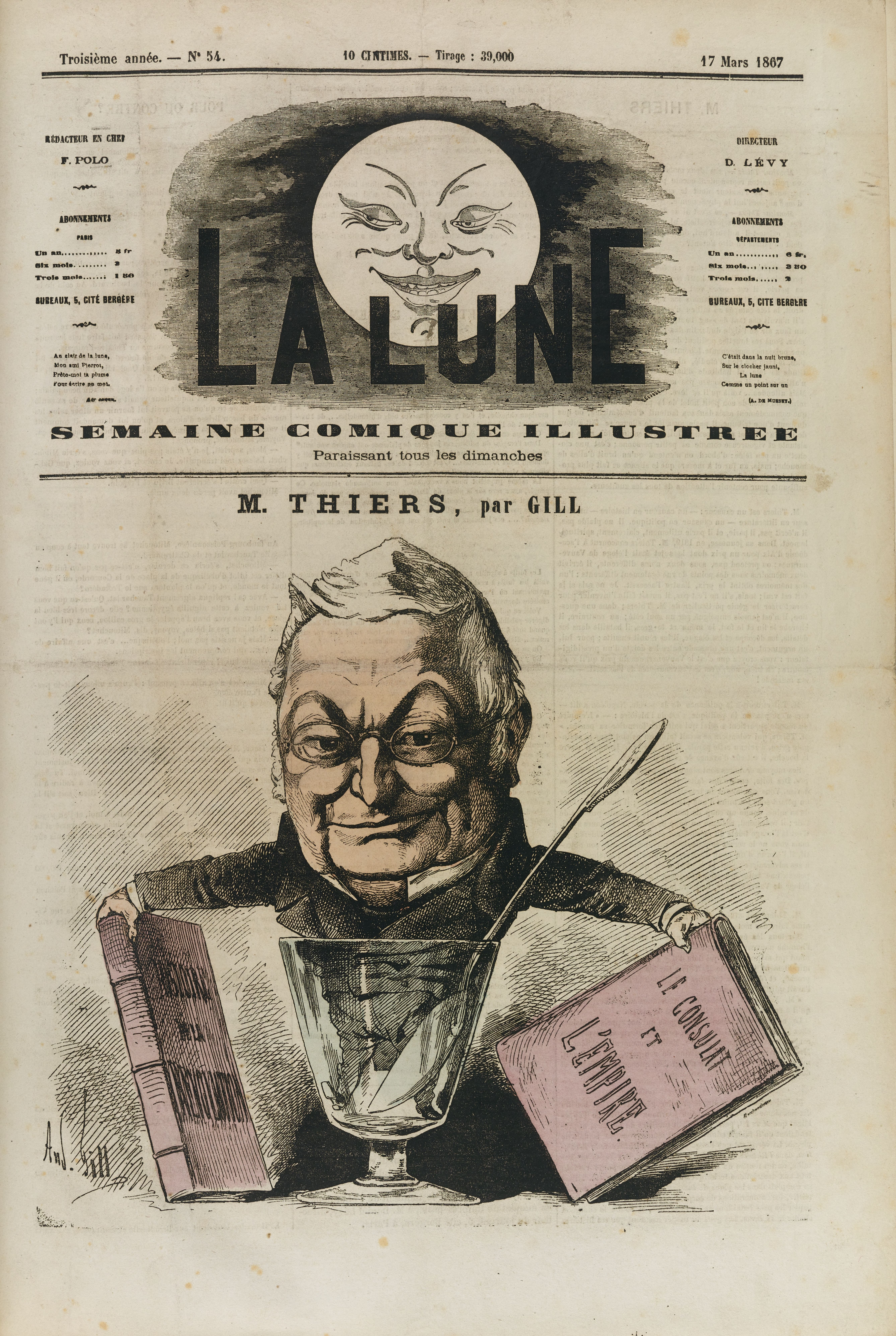 Caricature d'André Gill à la une du journal La Lune du 17 mars 1867